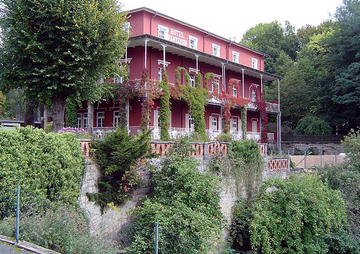 Hotel Fantaisie im Ortsteil Donndorf, Gemeinde Eckersdorf, ehemaliges Wohnhaus von Richard Wagner zwischen April und August 1872